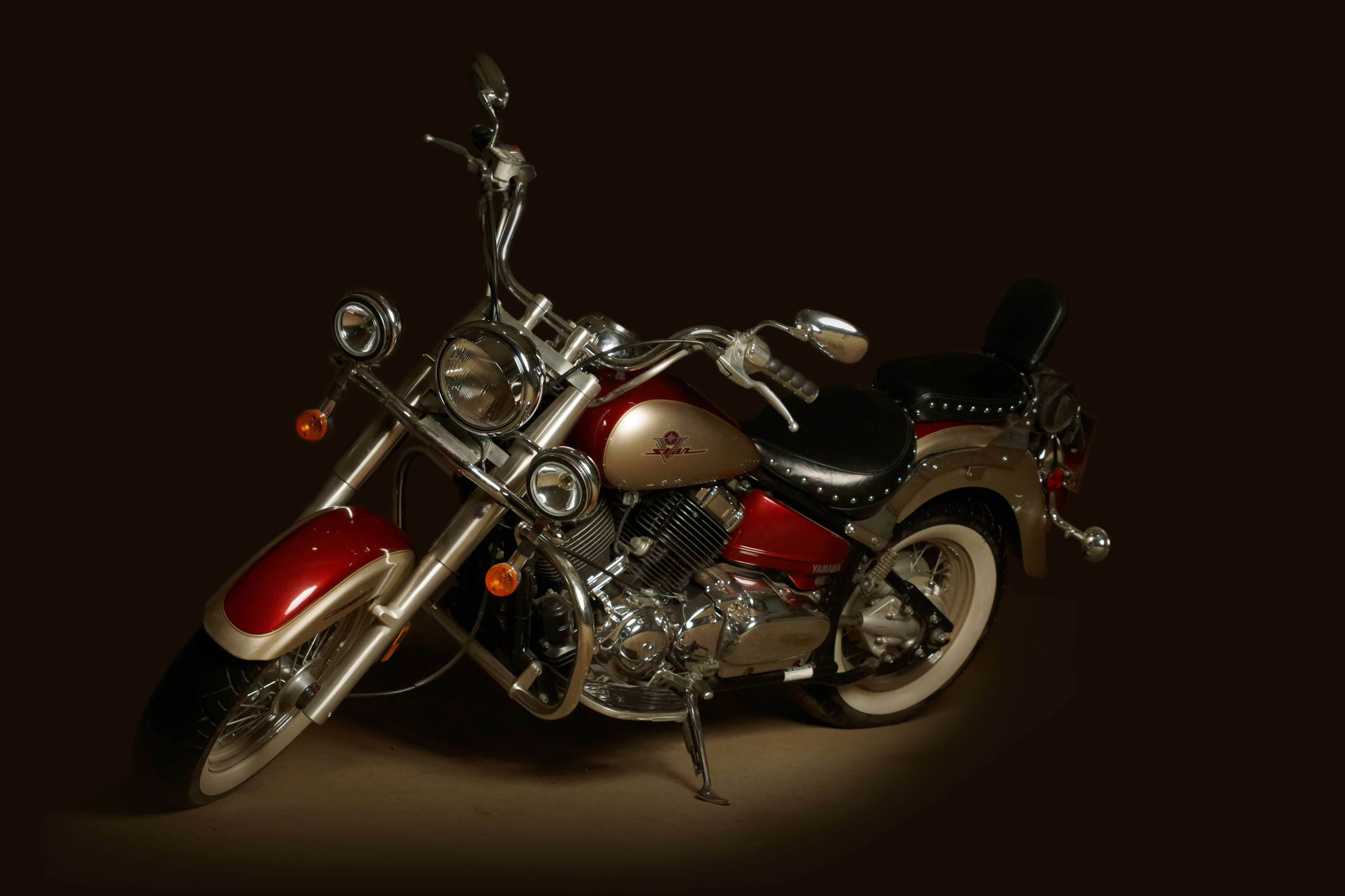 Yamaha V-Star 650 - название для американского рынка.